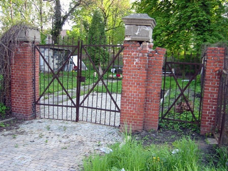 Cmentarz żydowski w Raciborzu - brama cmentarna